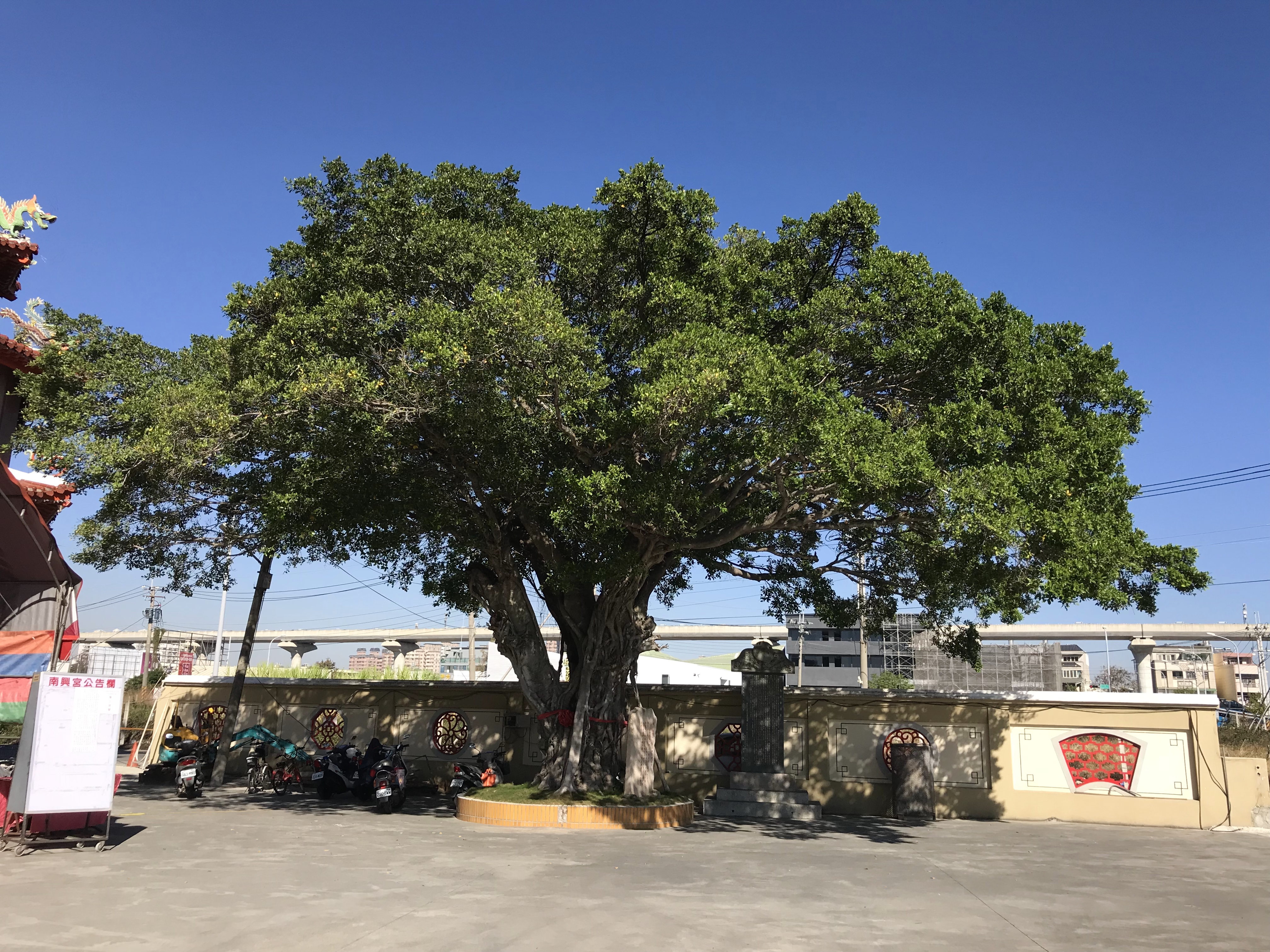 舊社南興宮榕樹